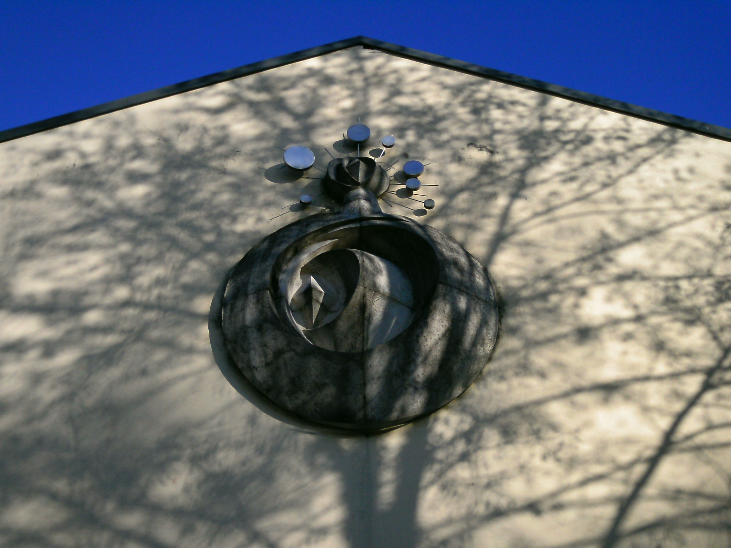 Ecclesia-Relief an der Westfassade der Kirche Ma.-Königin in Kapfenberg-Schirmitzbühel/Österreich.